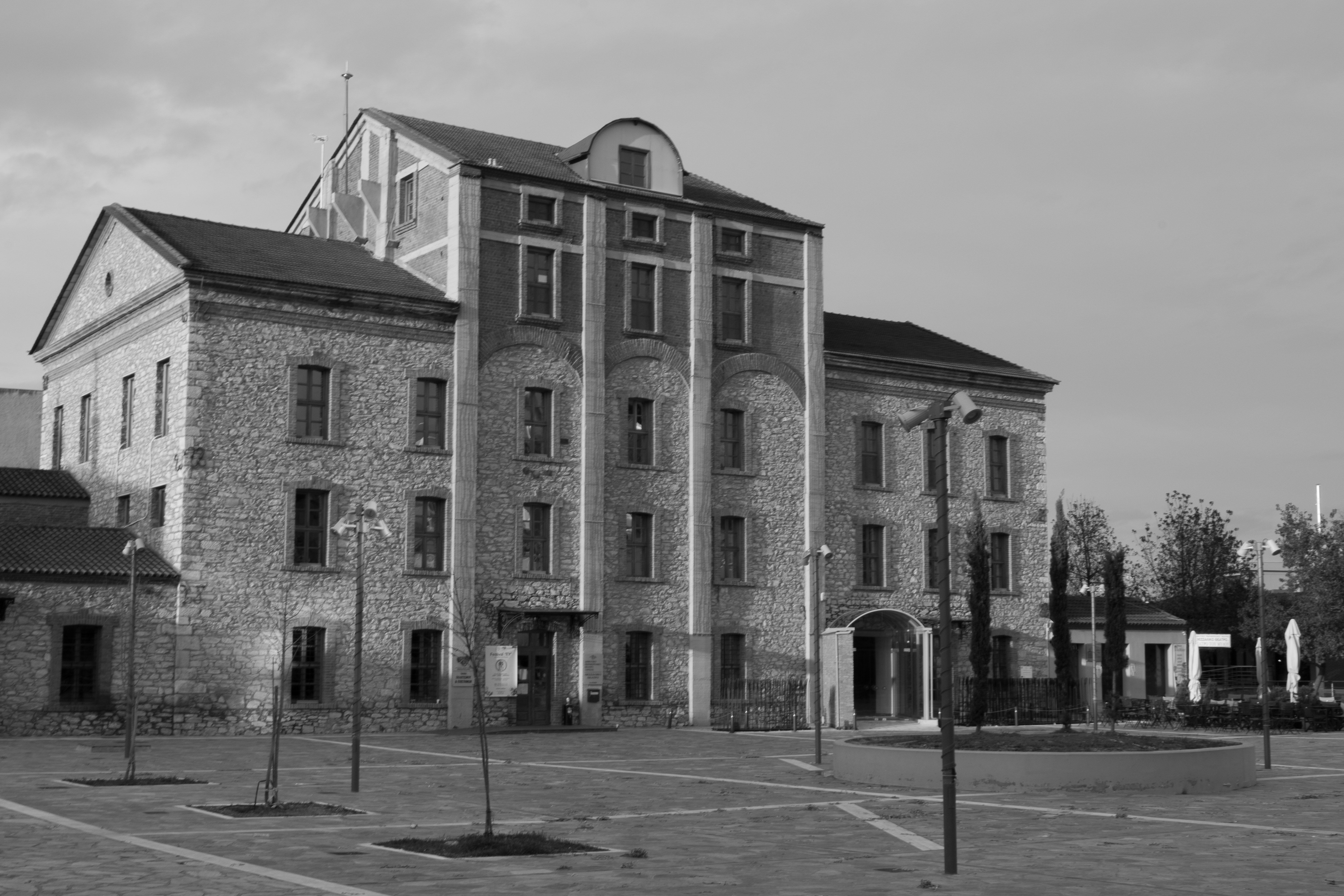 Μύλος Παπά, Λάρισα«Μύλος Παπά, Λάρισα»